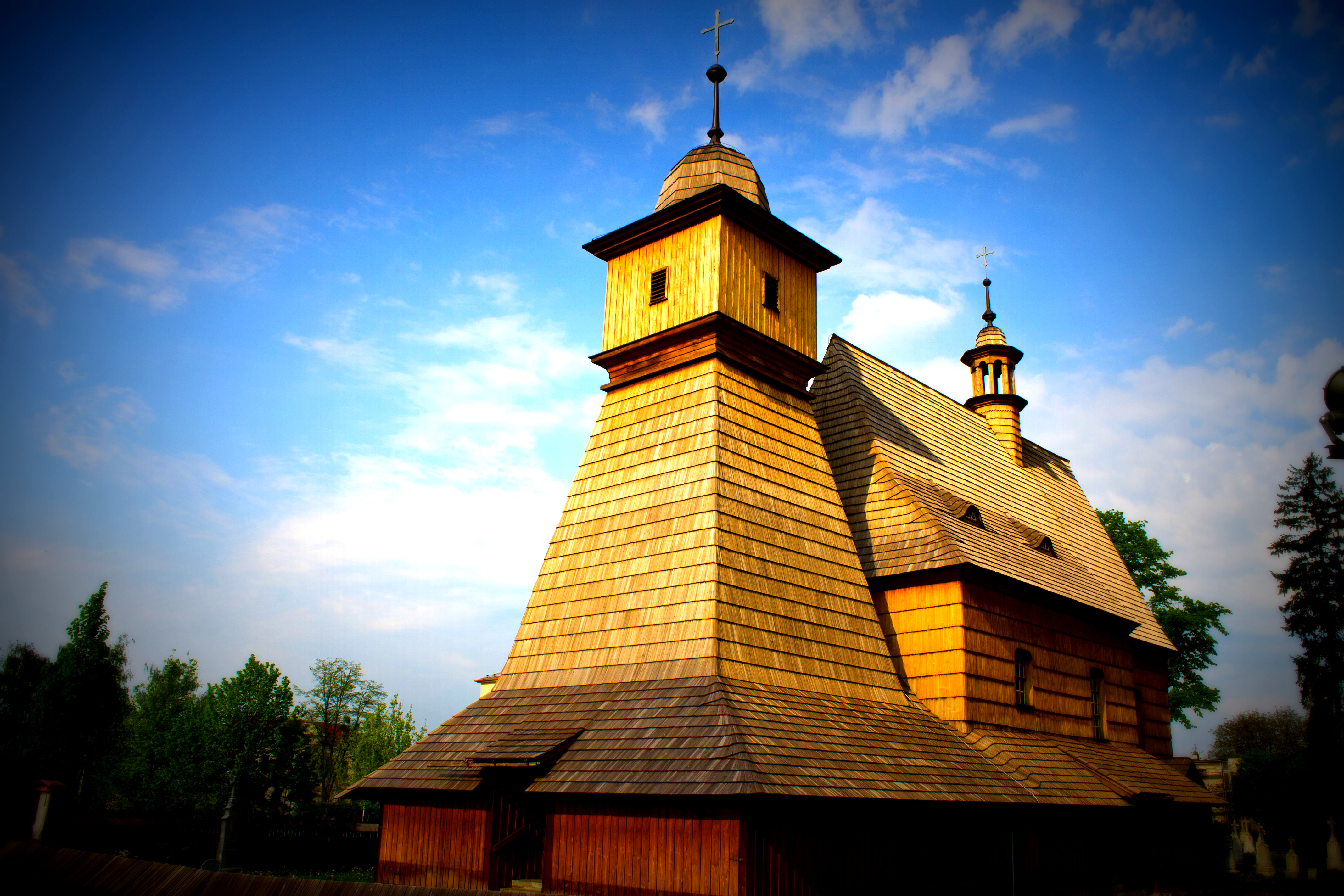 Kostel sv. Kateřiny (Ostrava), Hrabová, Jestřábského, Ostrava